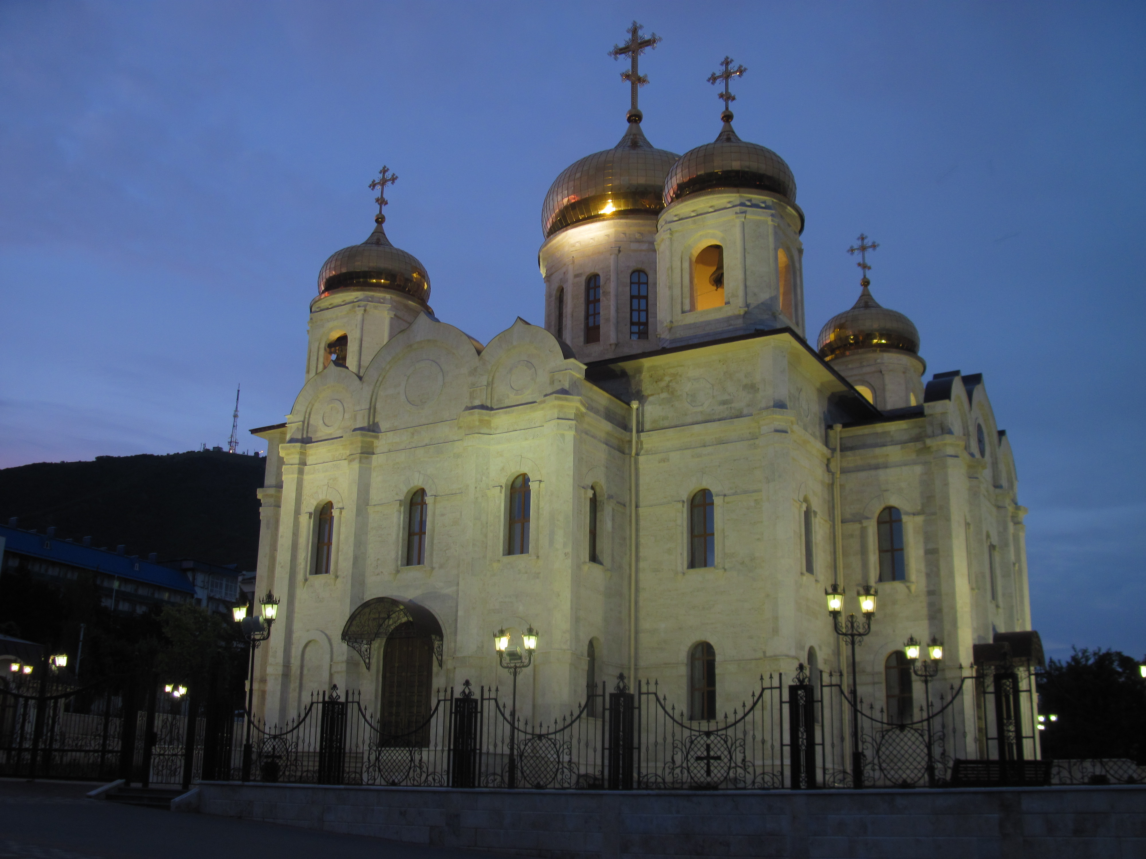 Спасский собор в Пятигорске